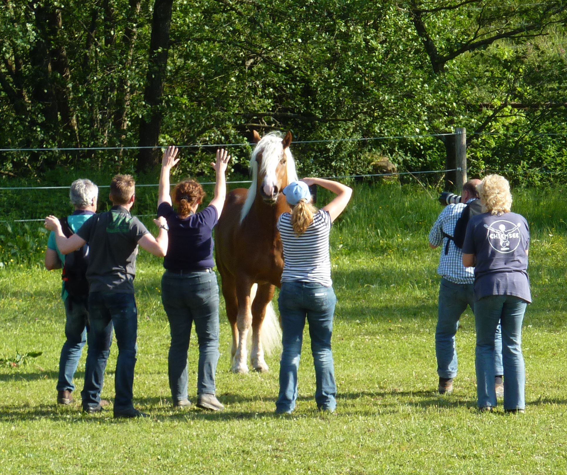 ein Schwarzwälder Kaltblut und Mitglieder eines Fotokurses